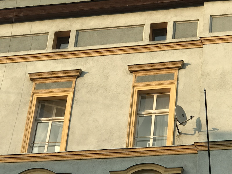 Kamienica przy ul. Wojska Polskiego 6-6a w Raciborzu